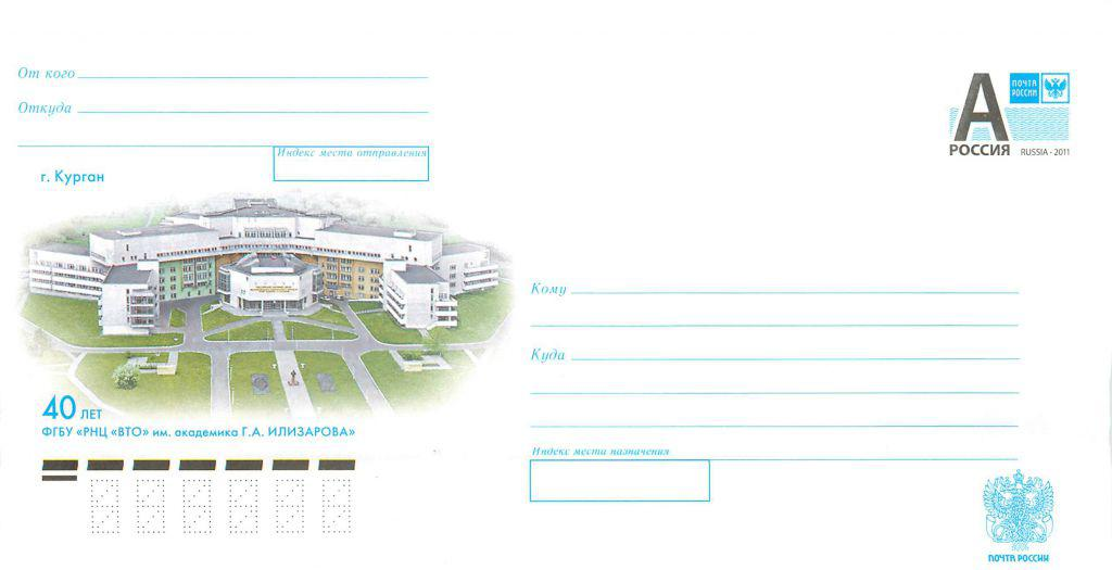 40 лет ФГБУ РНЦ ВТО им. академика Г.А. Илизарова, почтовый конверт